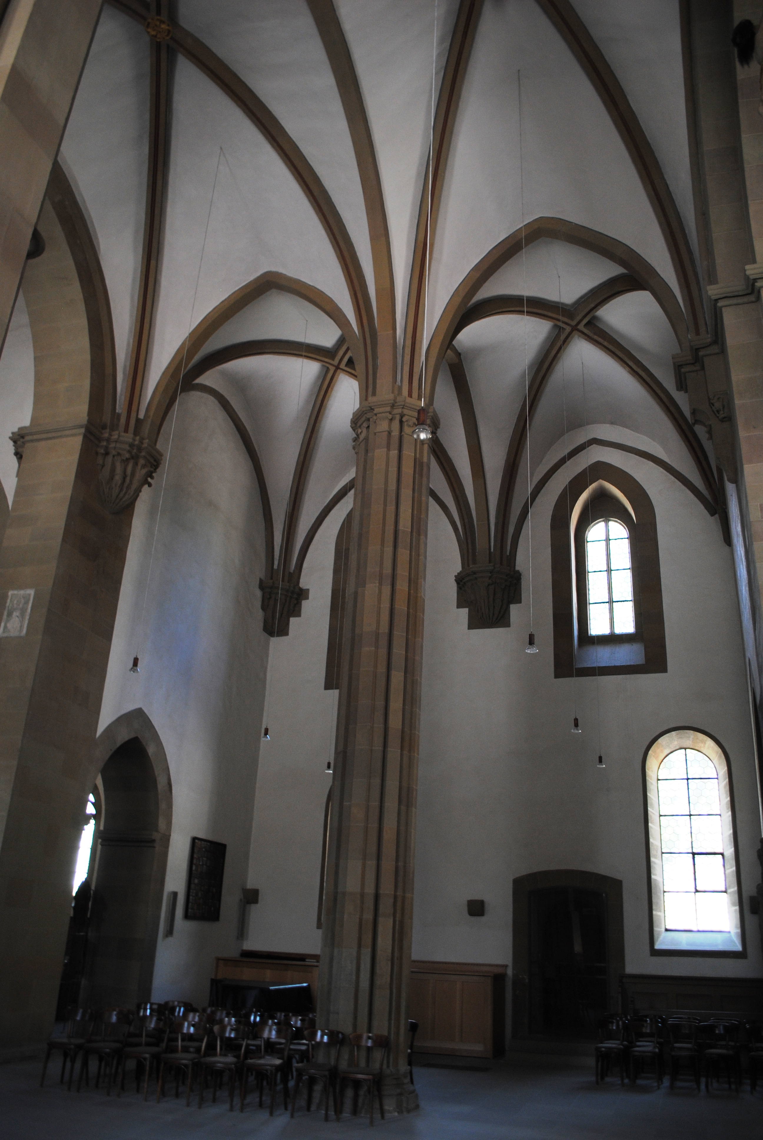 Gewölbe, Querhaus, St. Johannis, Schweinfurt